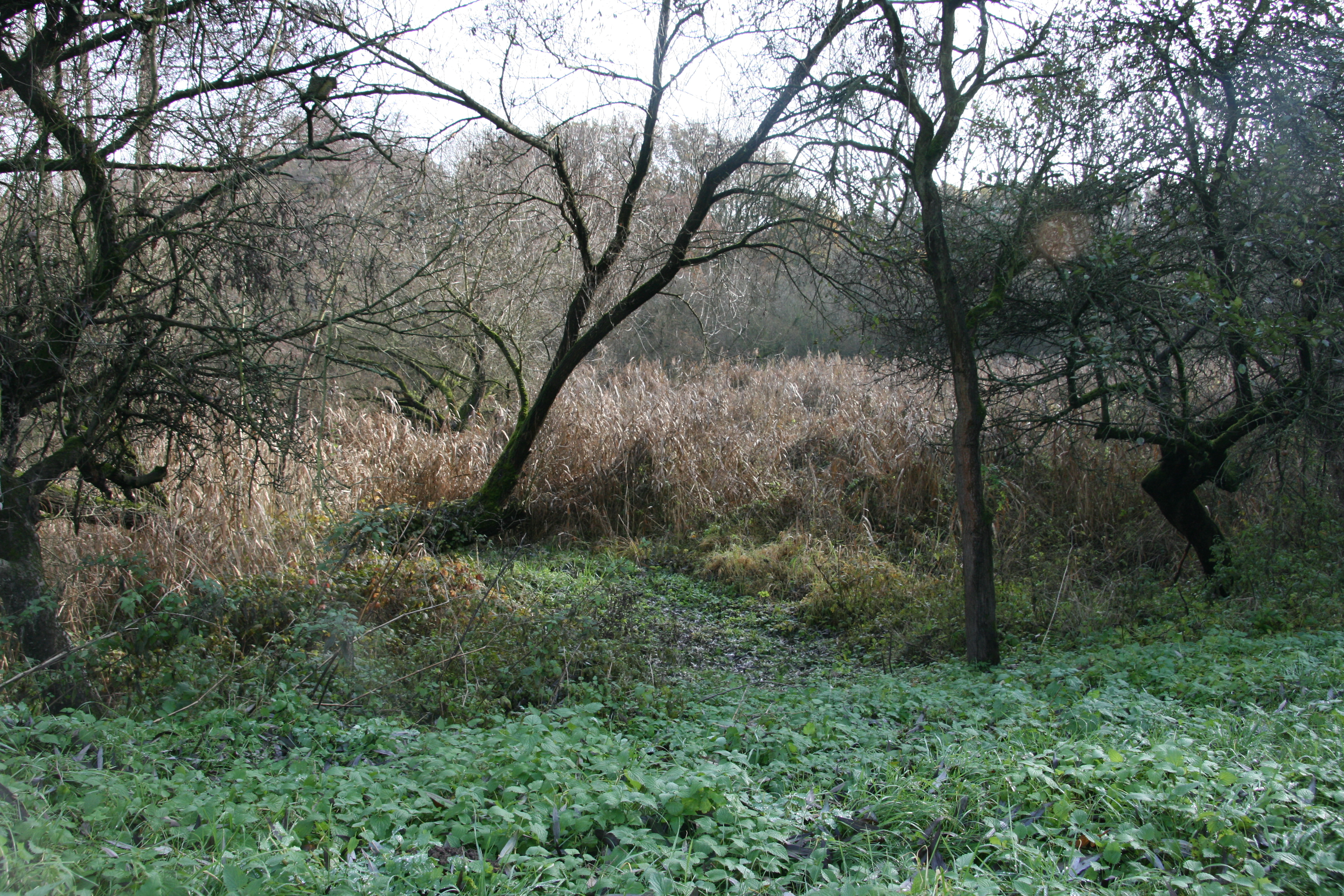 Městský les